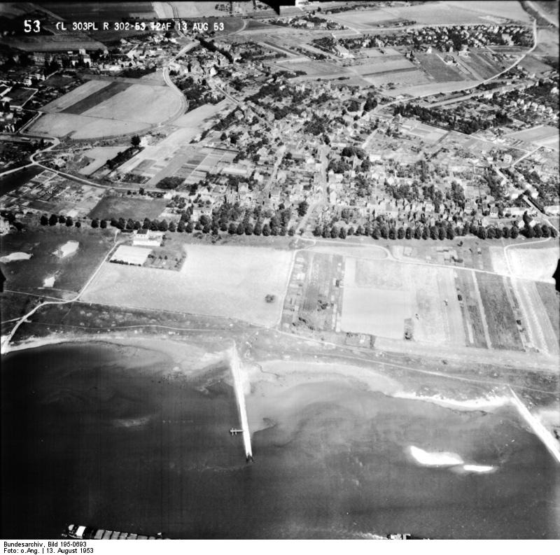 Rheinbefliegung der Alliierten 1953 Information added by Wikimedia users.